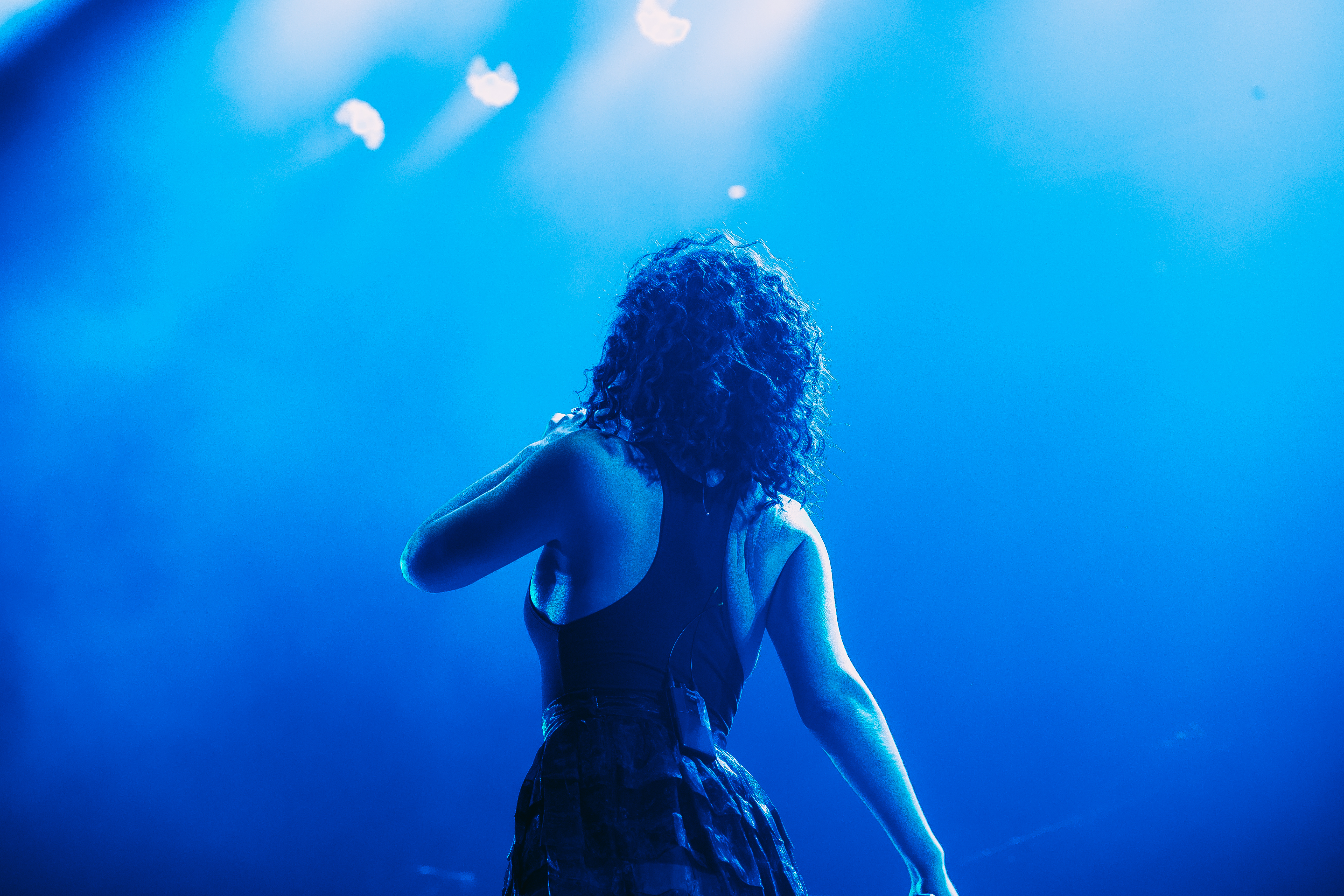 Photo: Krists Luhaers // @Kristsll